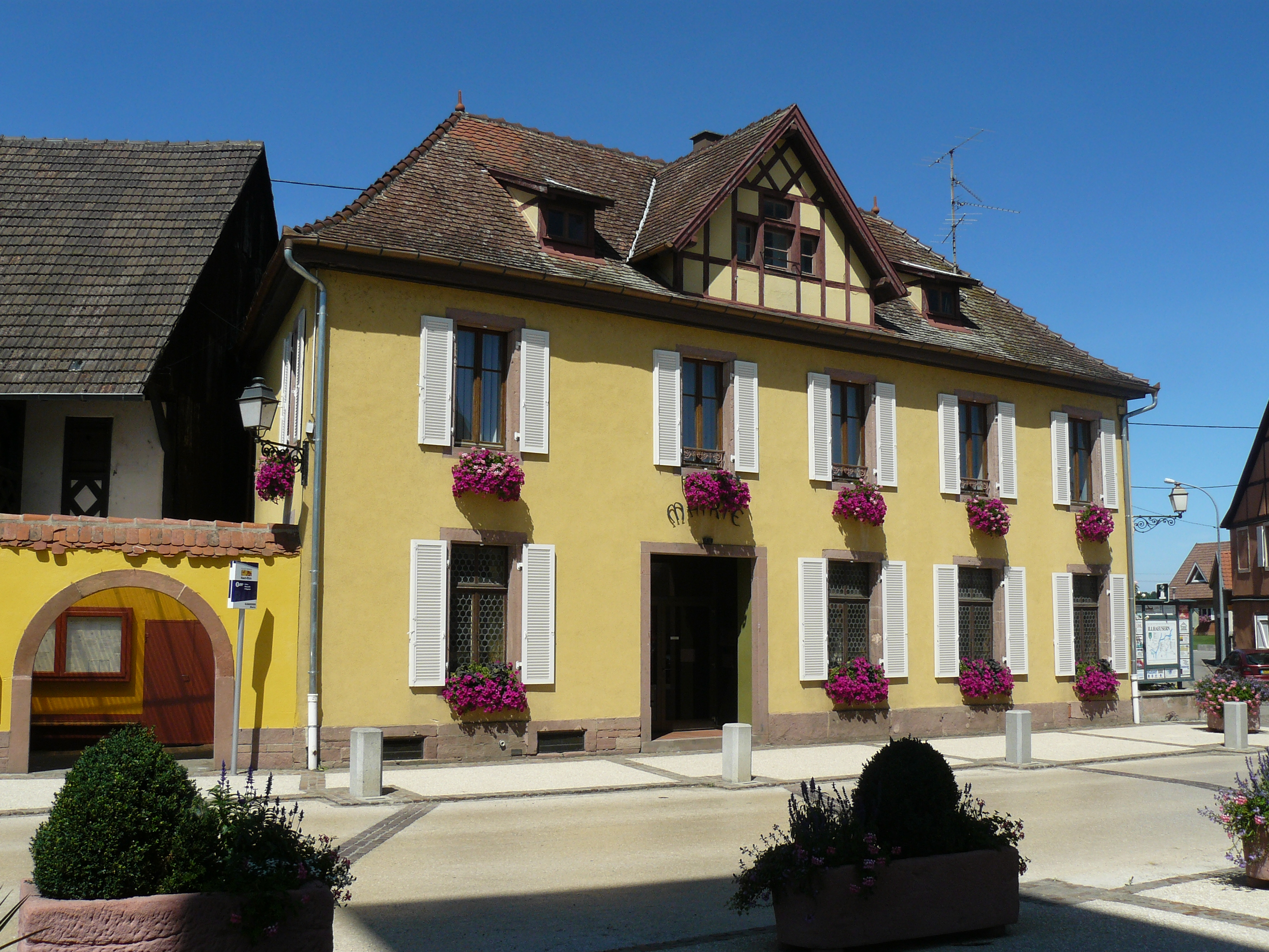 L'Hotel de ville